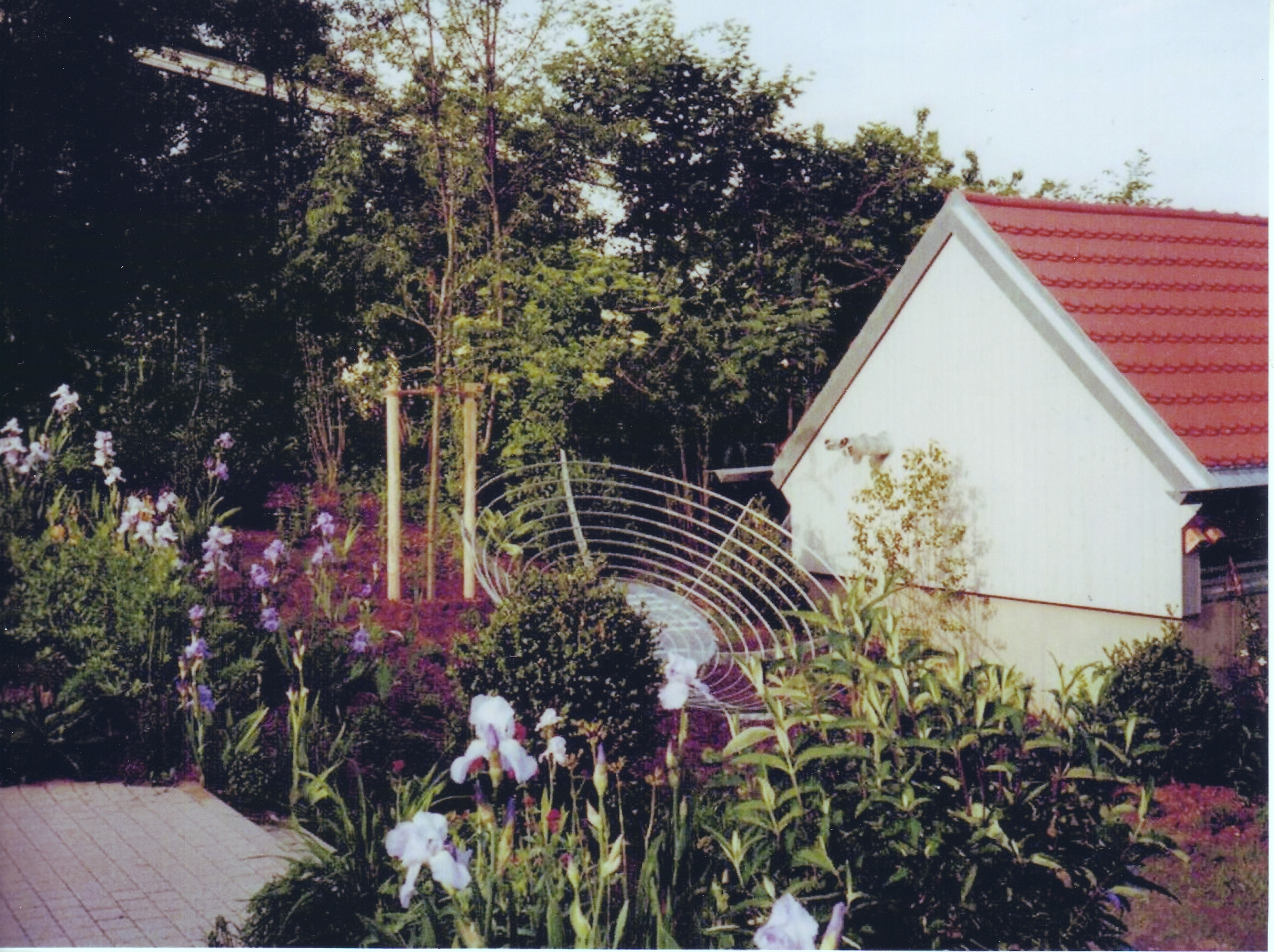 Lyrikstation mit einem Gedicht („Will nix mehr hören“) von Rainer Wochele, Wartberg in Stuttgart, 1993. – Rechts: Vereinsheim am Egelsee. Das Gedicht ist seit mindestens 2009 verschwunden.